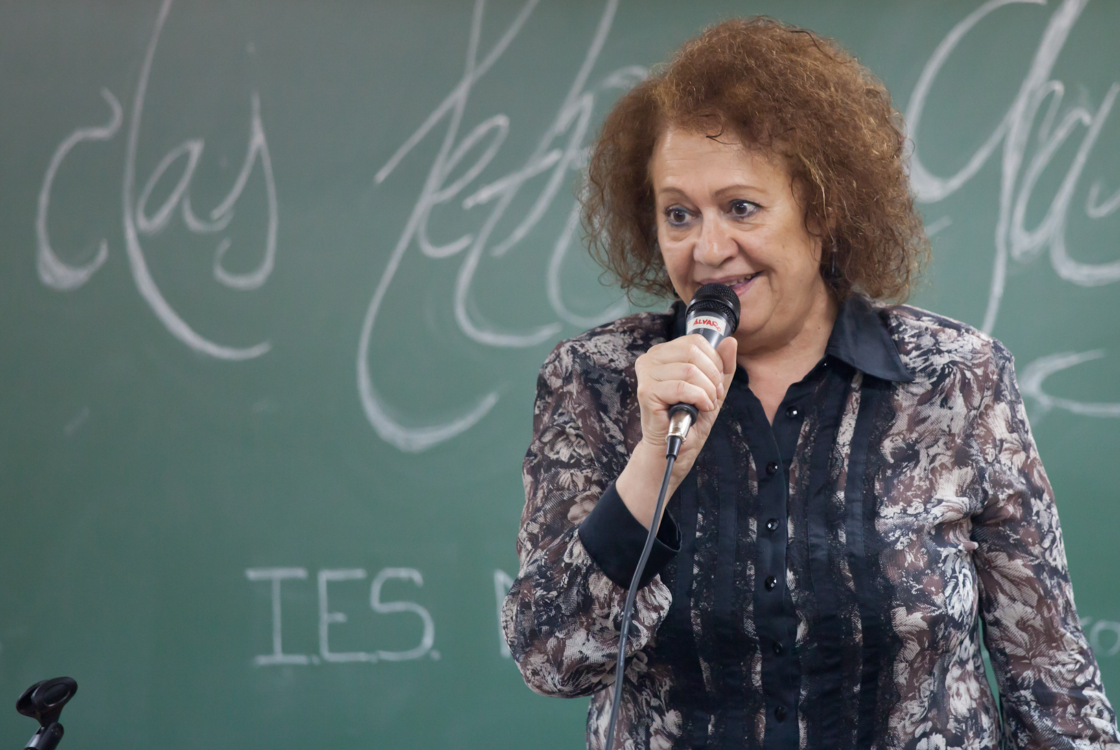 Marica Campo. A Estrada